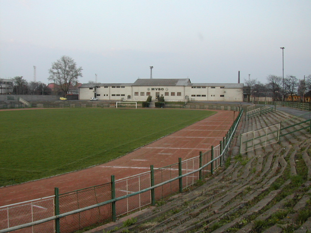 Miskolci VSC focipályája